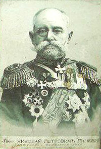 Generał M.P Liniewicz